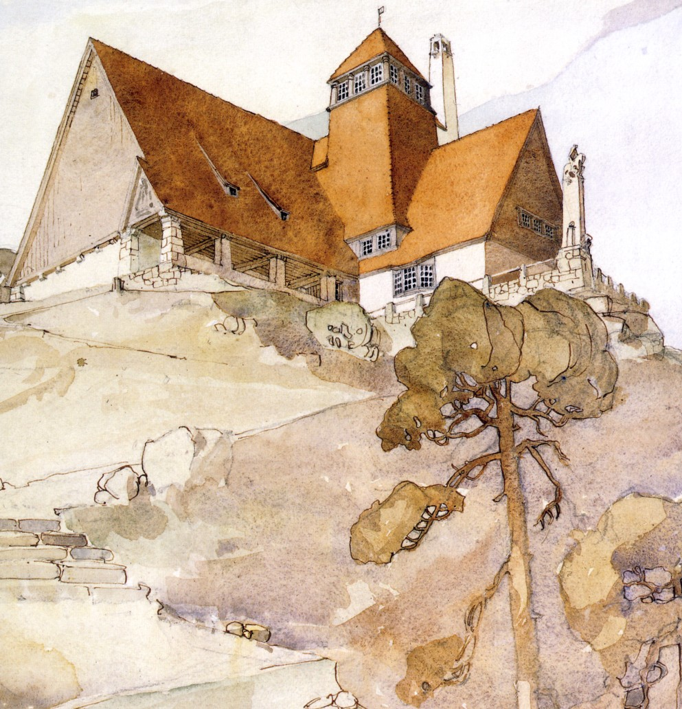 Millesgården på Lidingö, akvarell av Karl M. Bengtson (något beskuren i nederkant)